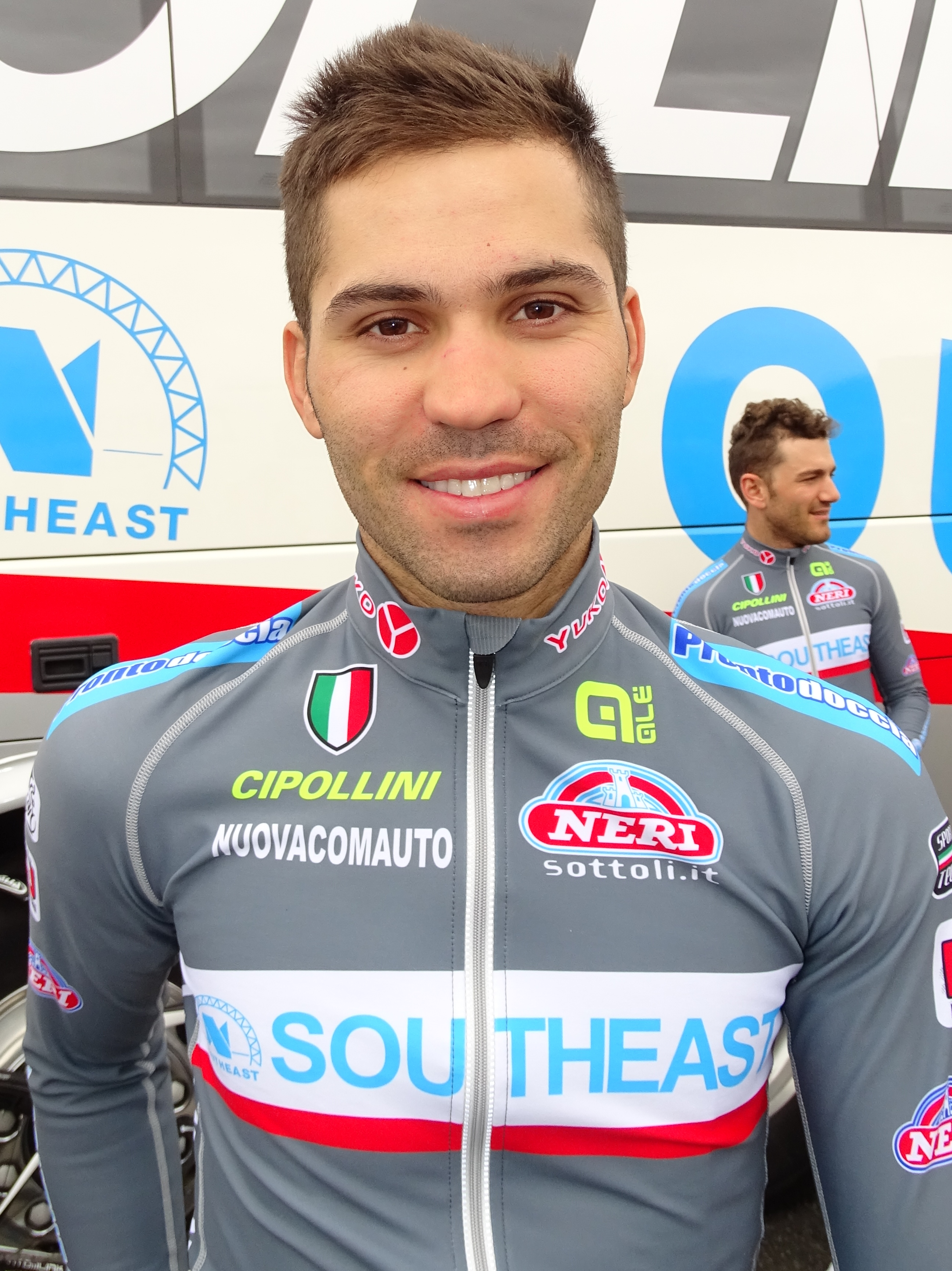 Reportage réalisé le mardi 31 mars à l'occasion de du départ de la première étape des Trois jours de La Panne 2015 à La Panne, Belgique.